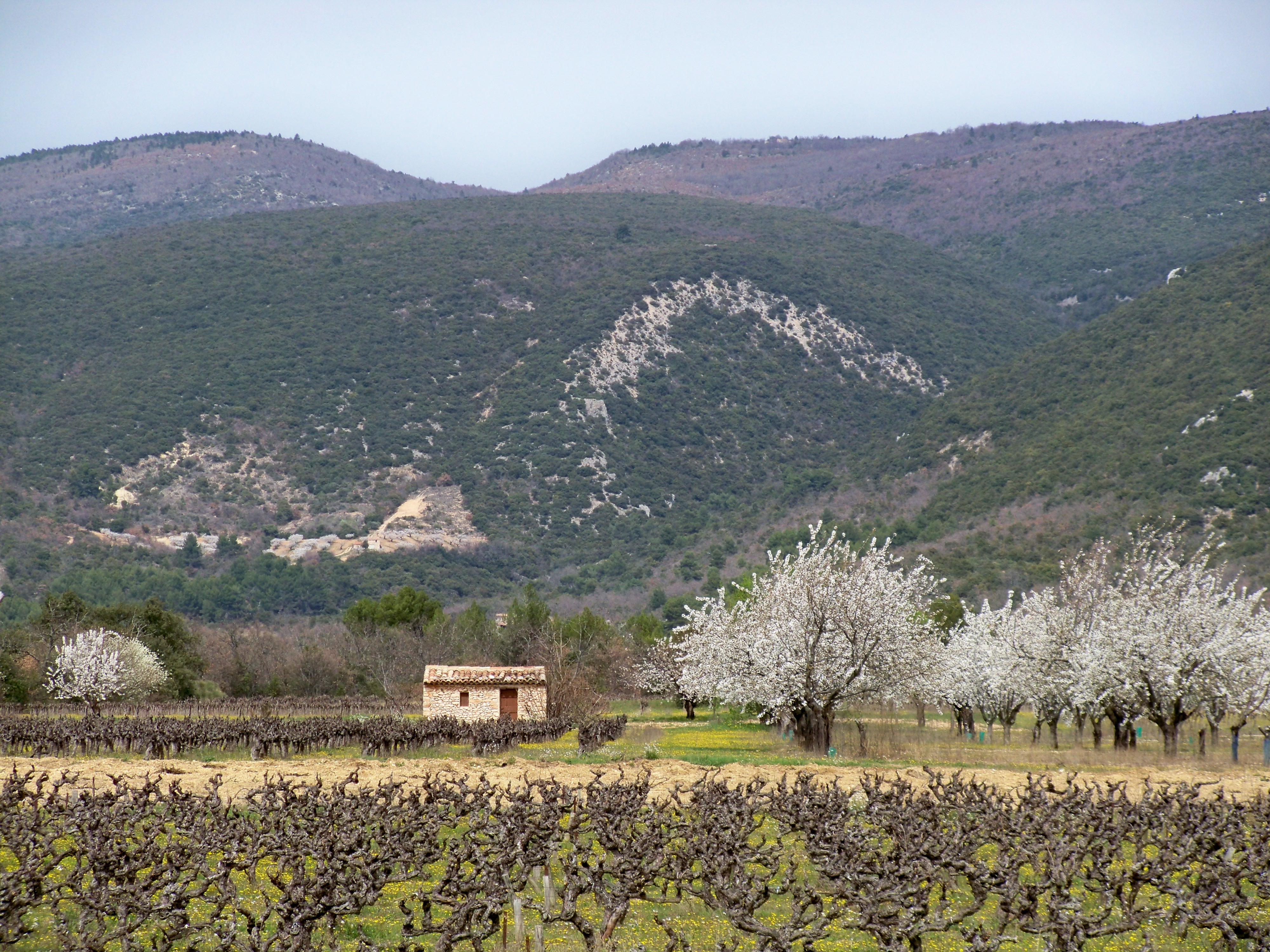 vigne et cerisiers près du Petit Clément, commune de Villars, Vaucluse, France